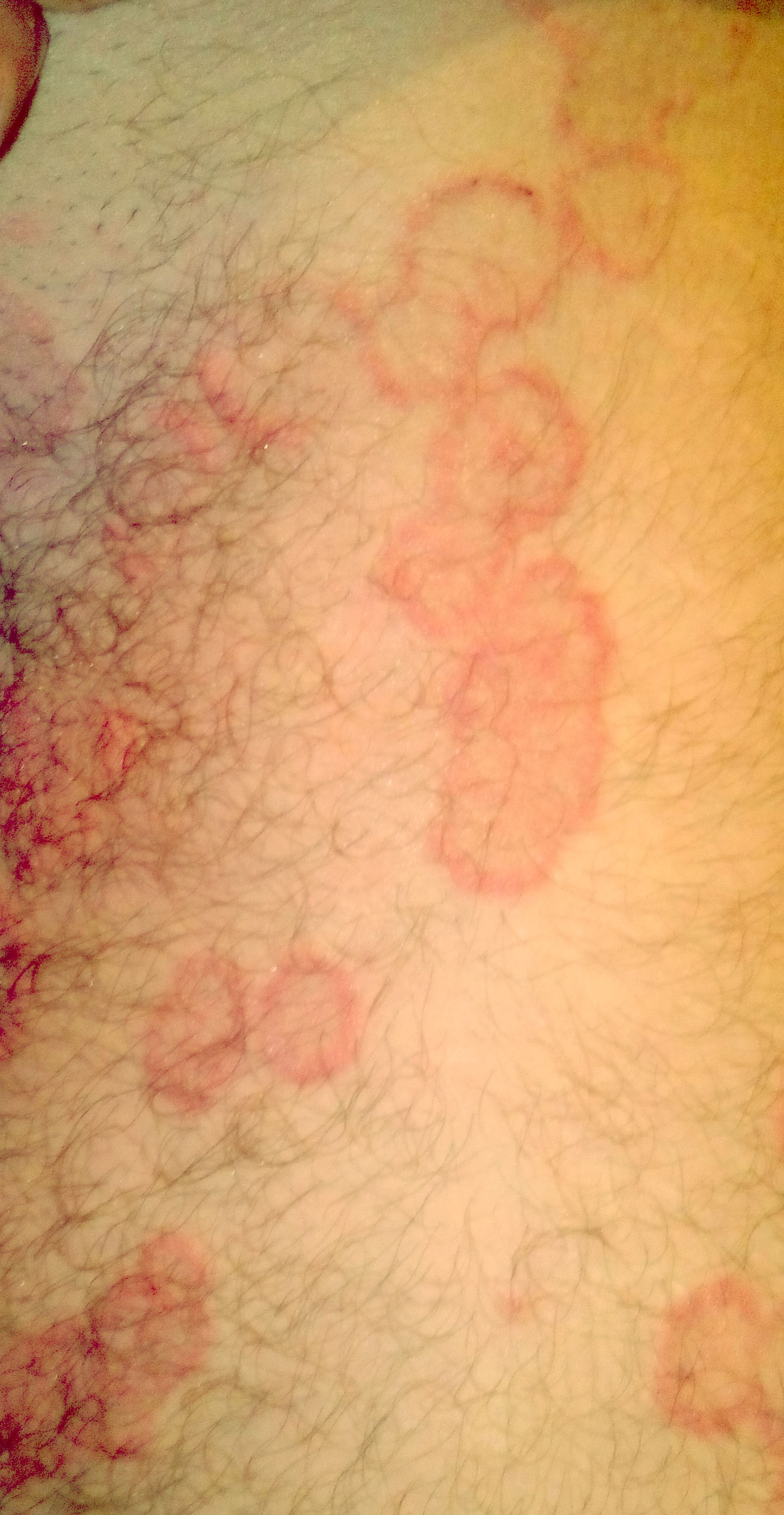 هذه بعض من اعراض المرض